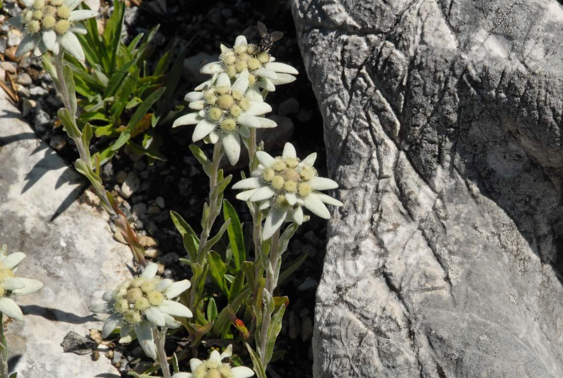 Schachen / Wetterstein, Alpengarten